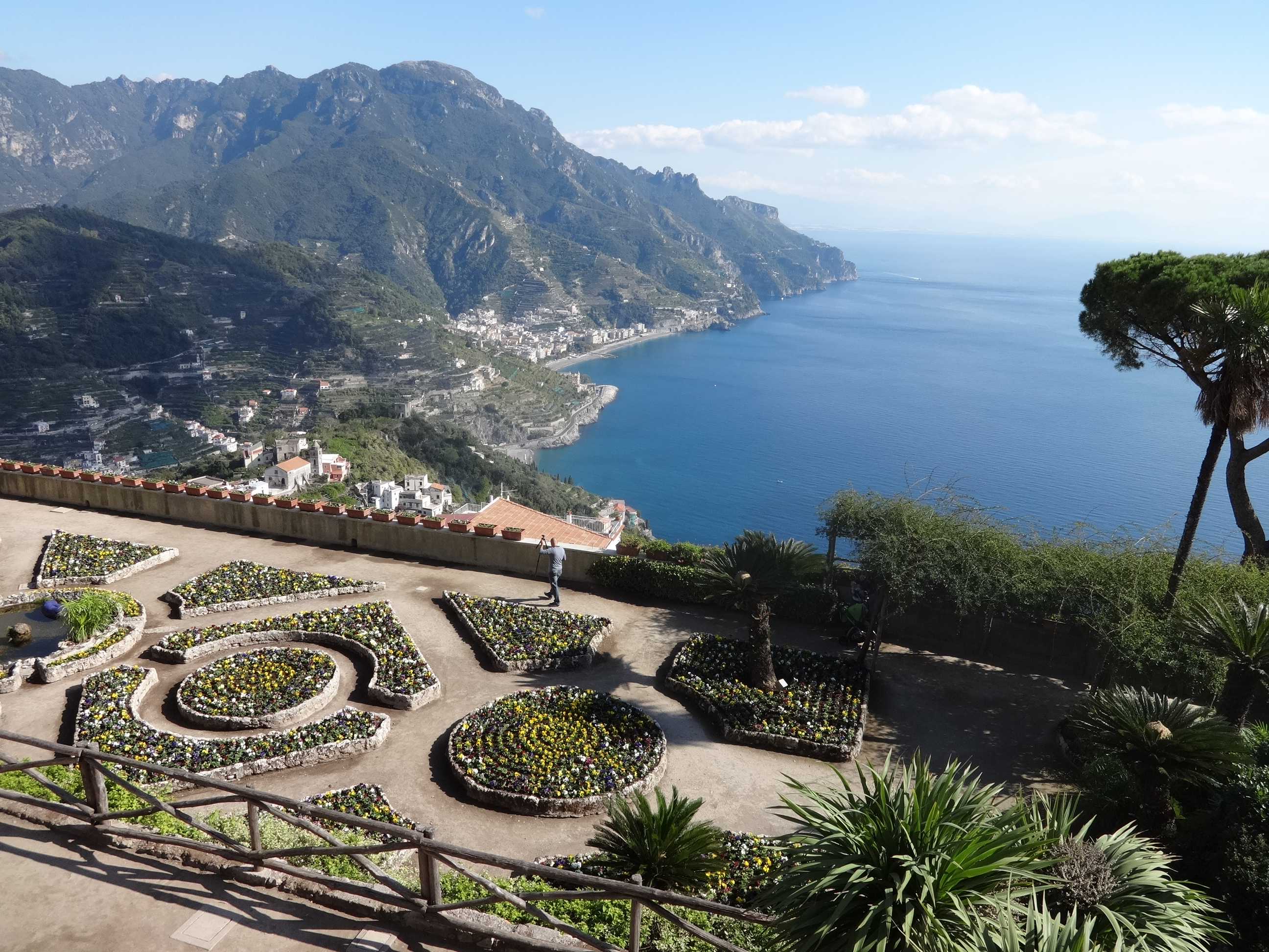 Panoramic view of the terrace garden at Villa Rufolo